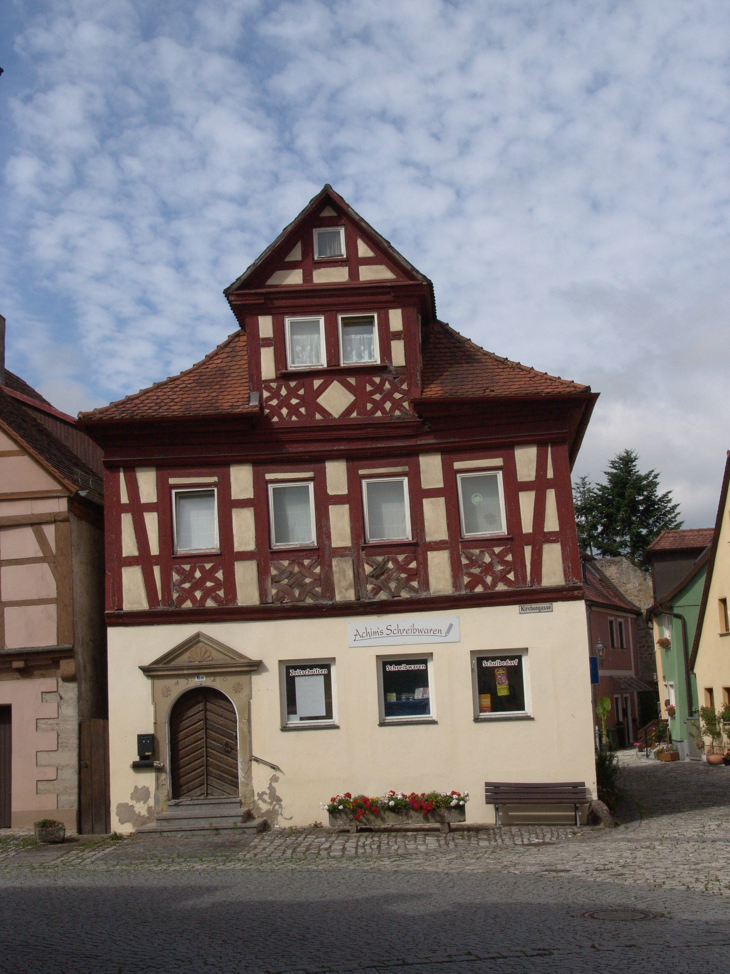 Leutershausen, Kirchengasse 6